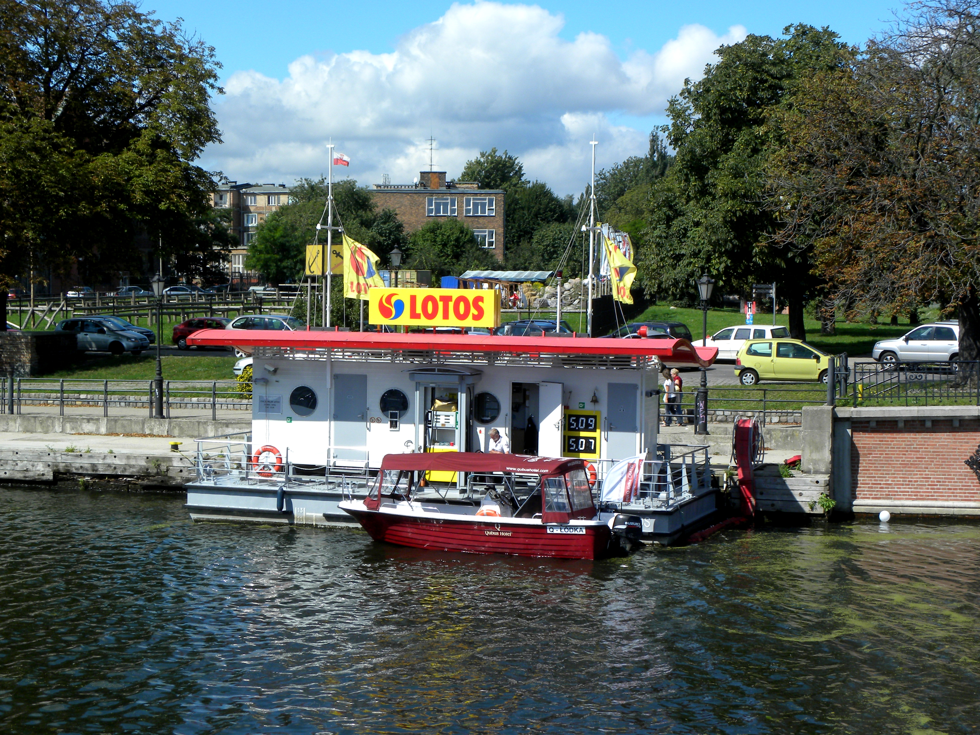 Stacja benzynowa dla łodzi